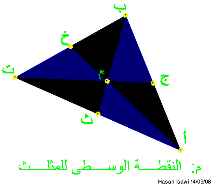 Link: مُنح الأذن رقم: OTRS #2006051010012313